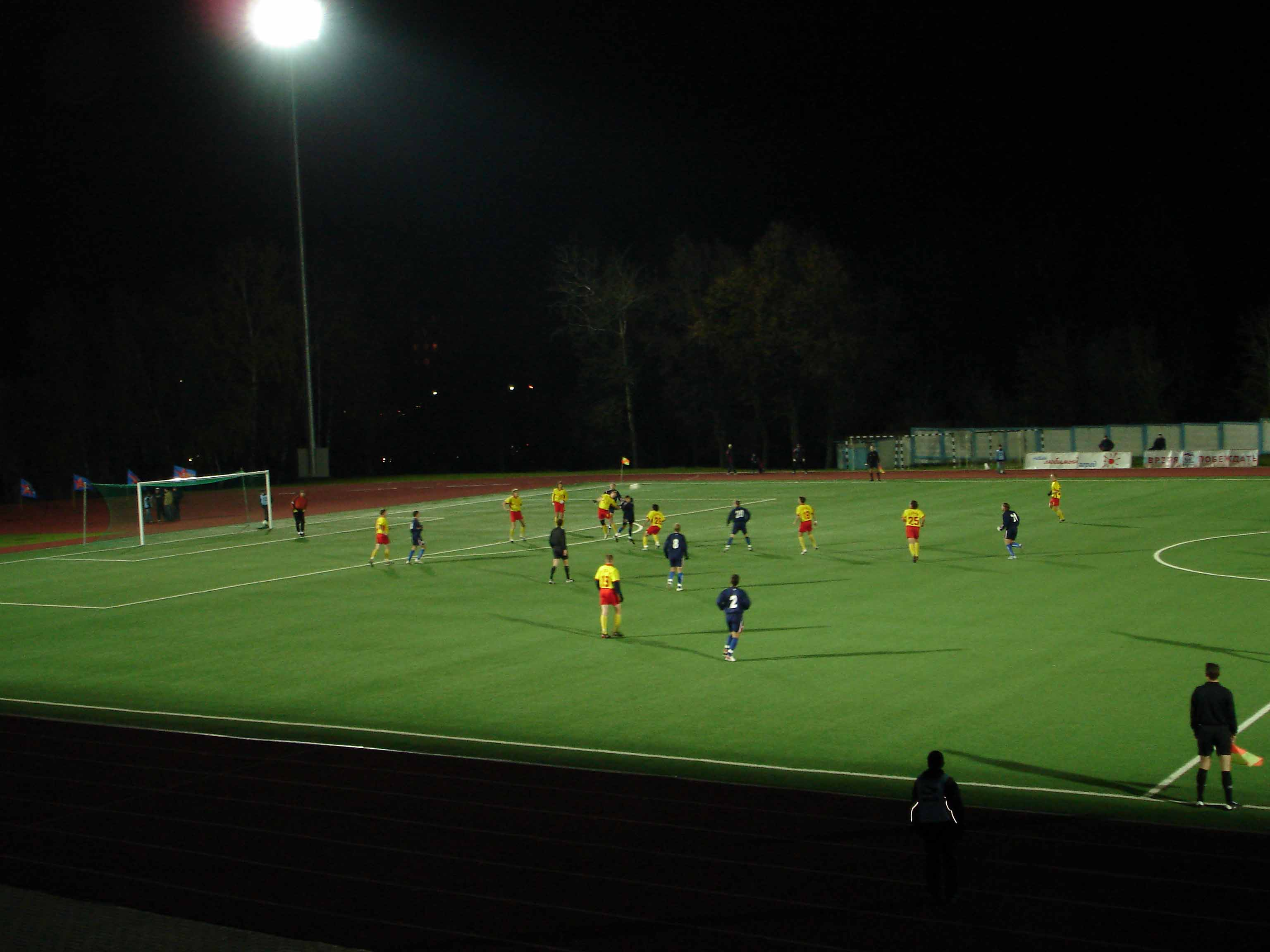 Звезда-ЛобняАтака ФК Звезда Серпухов на ворота Лобни-Аллы